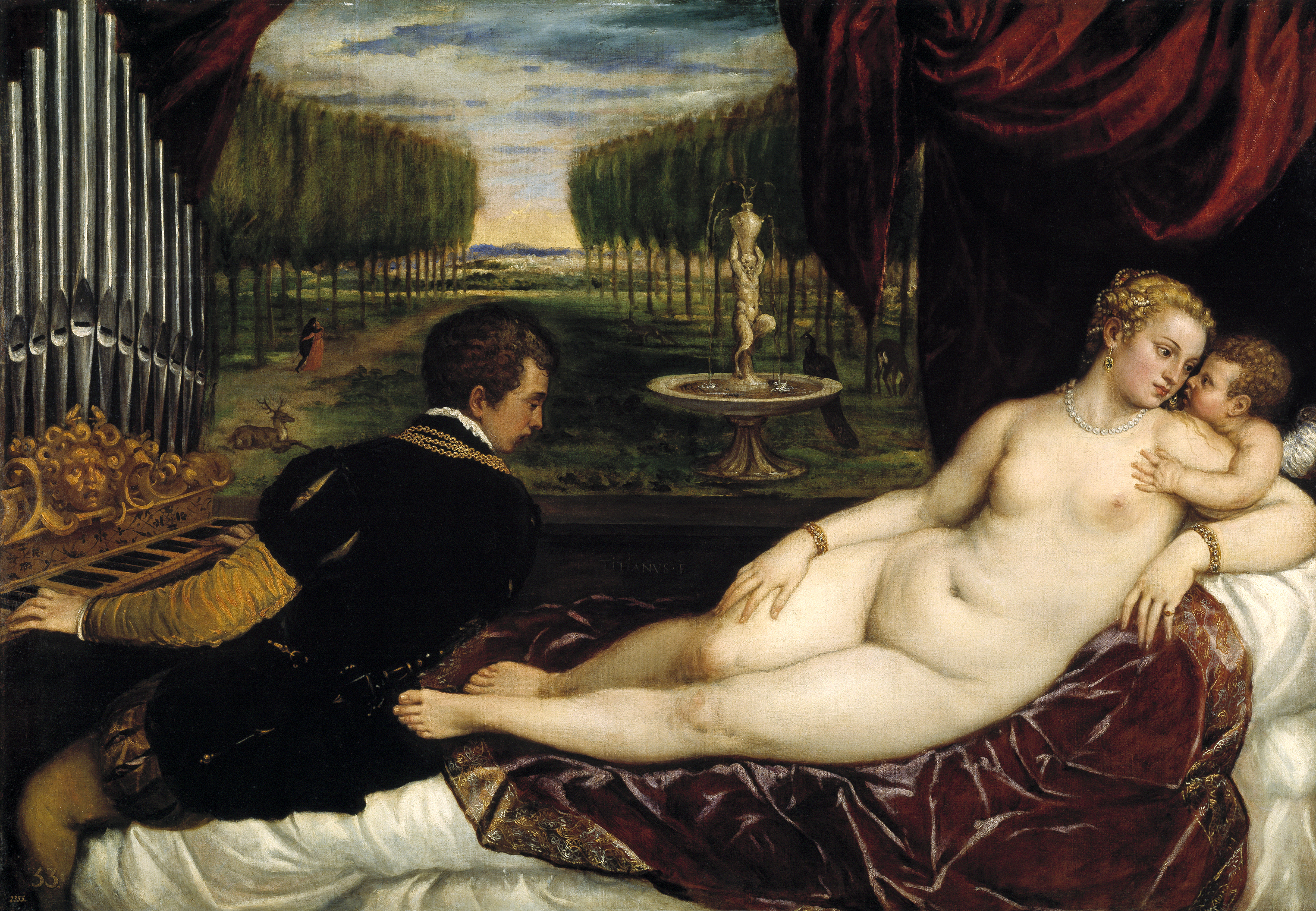 La obra representa a la diosa Venus recostada en un lecho y acariciando un perro al tiempo que escucha al caballero que toca el piano y que la observa.